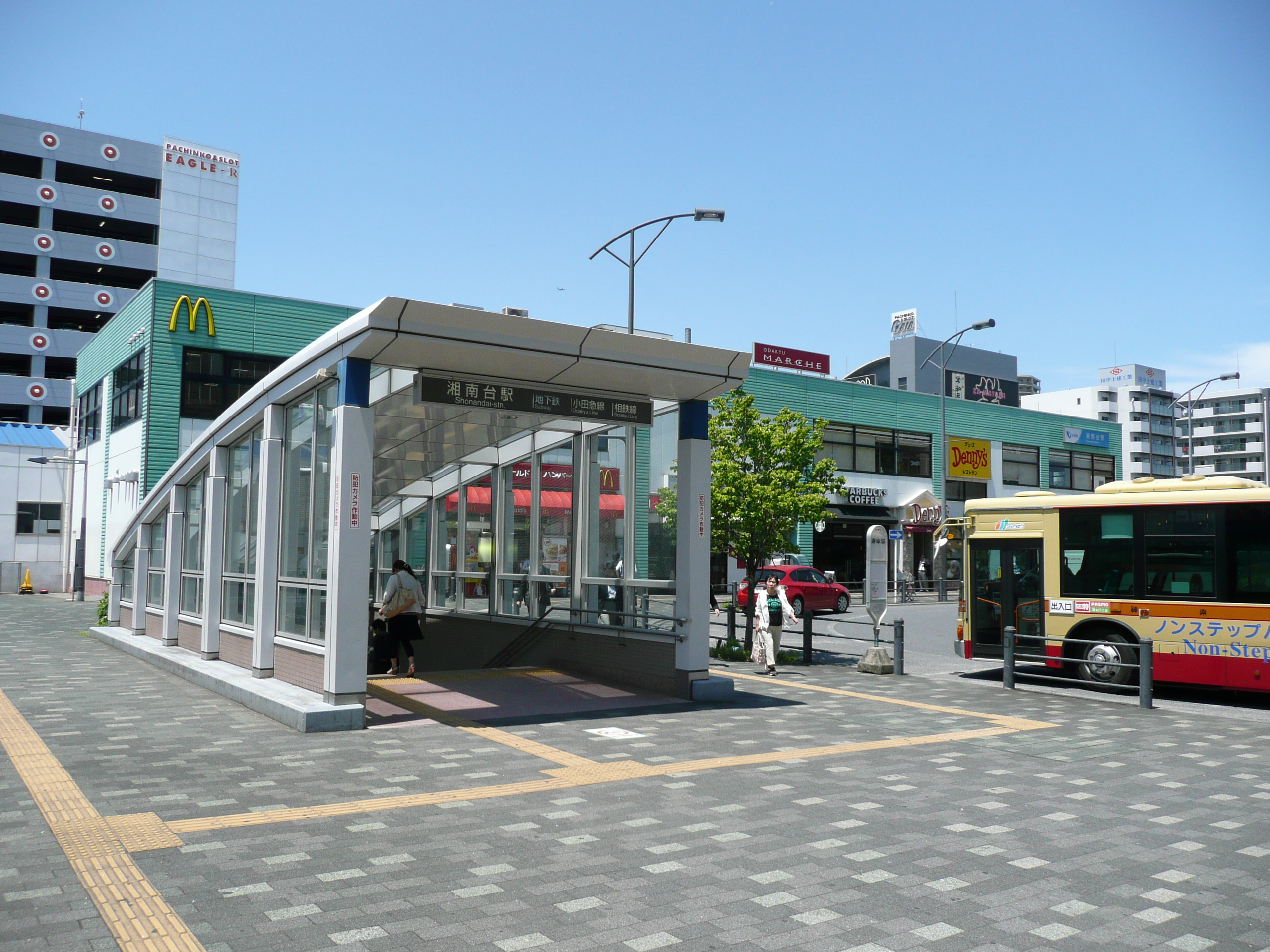 湘南台駅東口